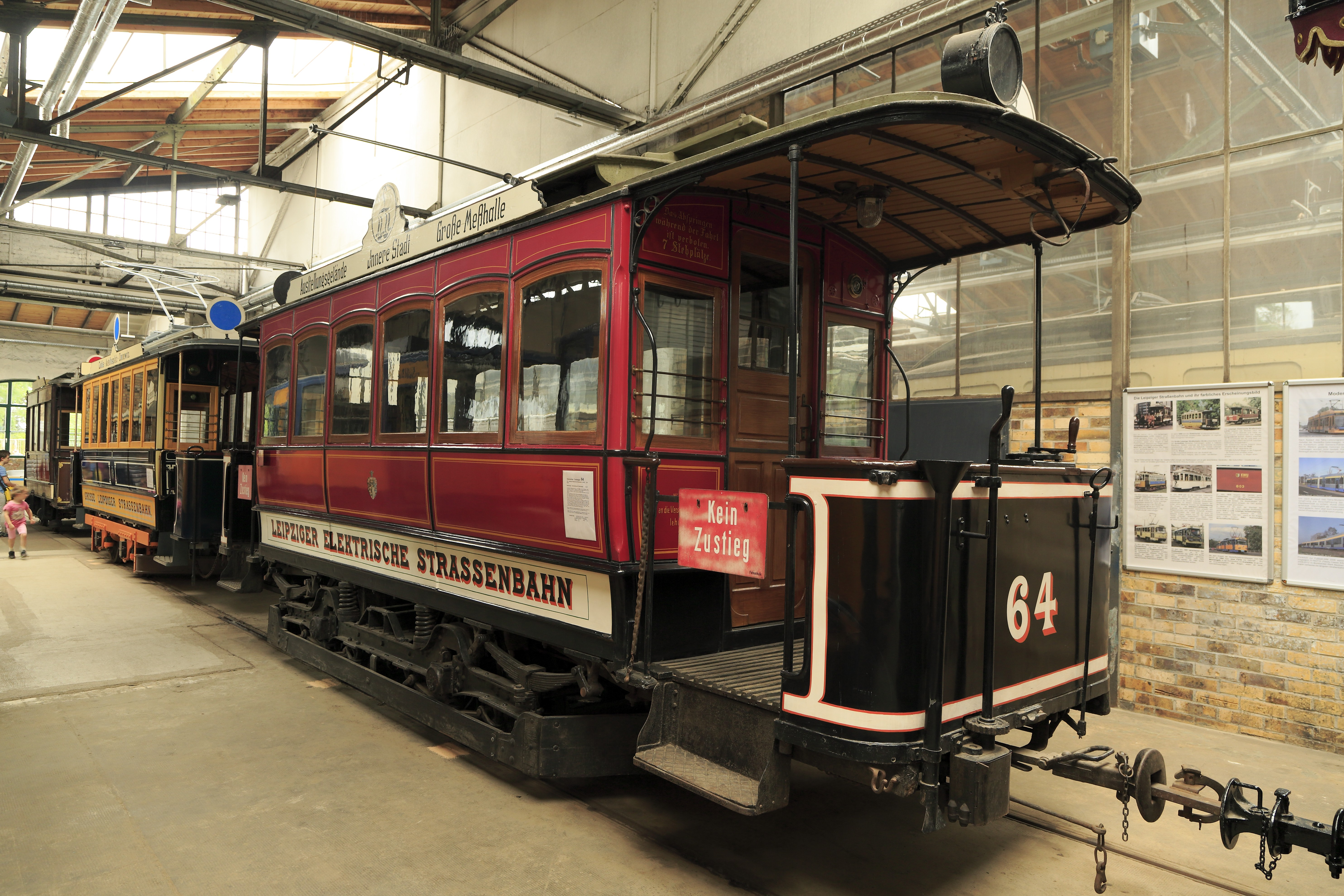 Sechsfenstriger AEG-Motorwagen, Erstausrütung der Leipziger Elektrischen Straßenbahn. Die Bauart war von Anfang an zweimotorig mit verlustarmer Serienparallelschaltung der Fahrmotoren. Zusammen mit dem Wagen 308 des Konkurrenzbetriebes Große Leipziger Straßenbahn wurde der Wagen des städtischen Typs 14 schon 1924 im Straßenbahnhof Plagwitz museal hinterstellt. Beide Wagen sind im Originalzustand erhalten, sie waren nie Arbeitswagen oder Gartenlaube. Der Wagen 64 mit der städtischen Nummer 854 wurde ausgewählt, weil man annahm, dass es der Eröffnungswagen 54 von 1896 sei. Beide Triebwagen sollten 1949 verschrottet werden, doch verhinderten das LVB-Mitarbeiter. Wegen der exotischen elektrischen Ausrüstung, die seinerzeit eine betriebsfähige Aufarbeitung als nicht sinnvoll erscheinen ließ, wurde der Wagen 64 1966 als Dauerleihgabe an das Verkehrsmuseum Dresden abgegeben. Zurück nach Leipzig kam er nach der Auflösung der dortigen Nahverkehrssammlung. Der Wagen behielt als einziger den Stangenstromabnehmer.Dahinter stehen der GLSt-Triebwagen 308 aus demselben Baujahr und der LPfE-Pferdebahnwagennachbau 95, Typ 3.